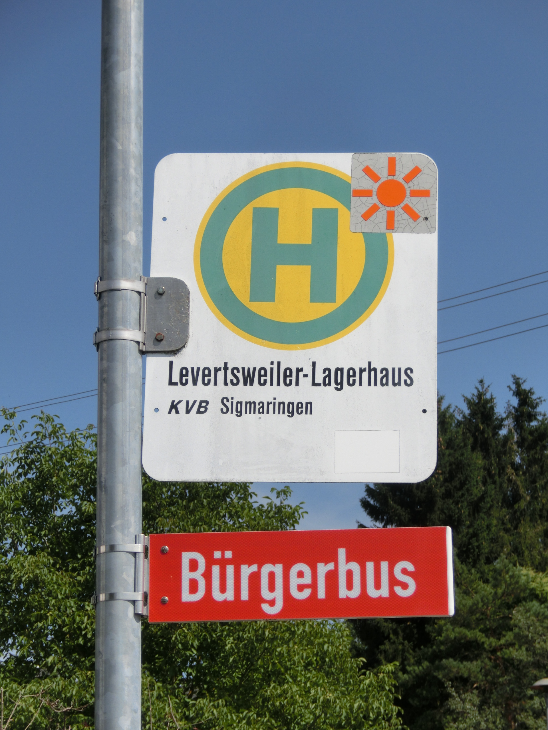 Deutschland (D) - Baden-Württemberg (BW) - Landkreis Sigmaringen (SIG) - Ostrach - Levertsweiler: Haltestellen "KVB" und Ostracher "Bürgerbus"